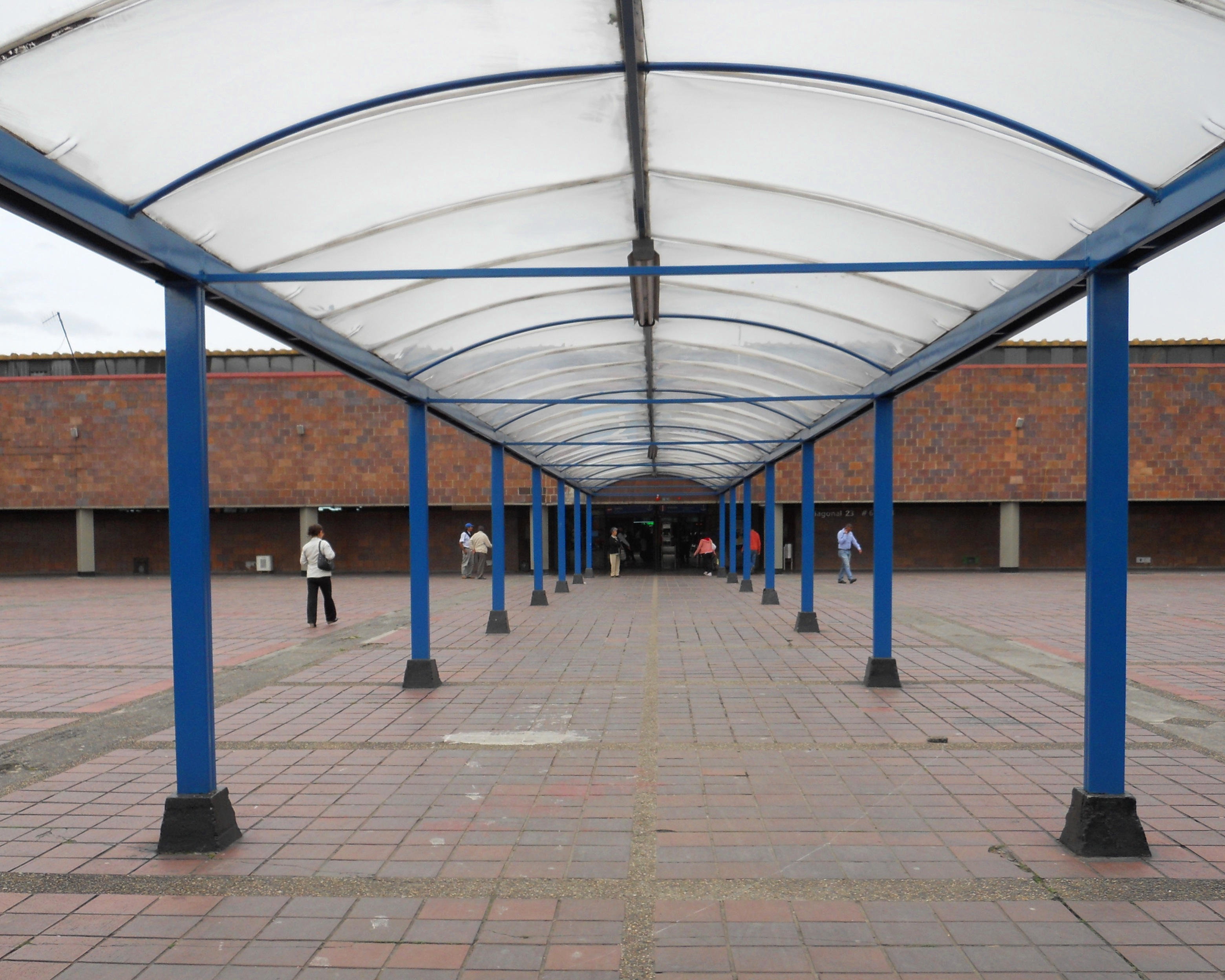 Bogotá, vía Oriental, entrada 2, Terminal de Transportes.